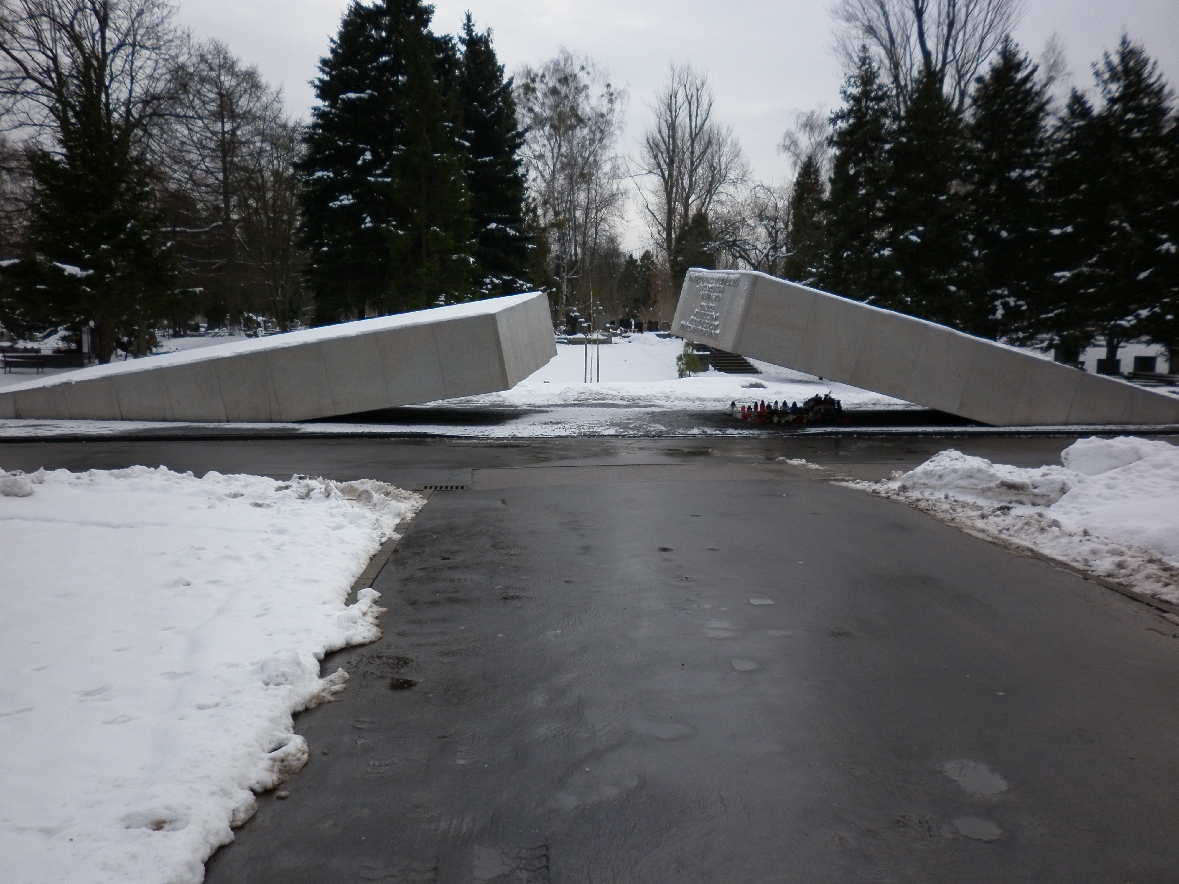 Pomnik Ofiar Katastrofy Smoleńskiej na wojskowych powązkach